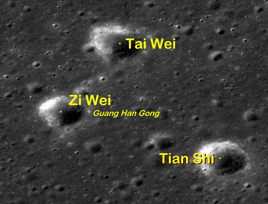 Lugar de alunizaje de la misión china Chang'e 3. (Imagen LRO)